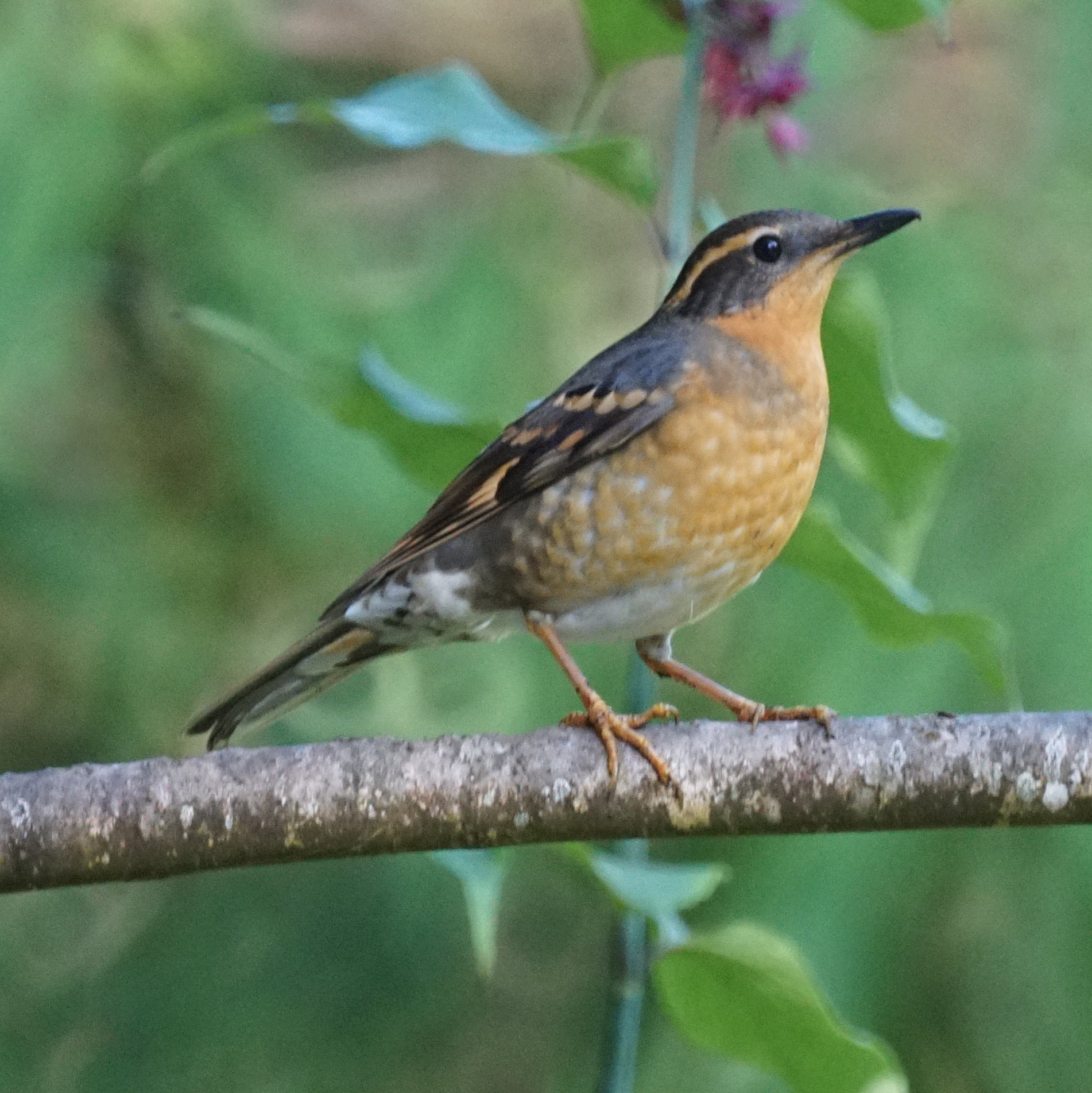 Golden Gate Park San Francisco